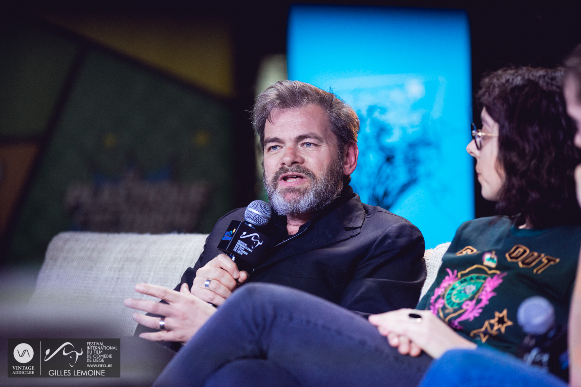 Clovis Cornillac plateau TV